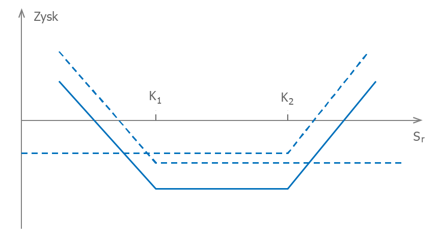 Strategia opcyjna strangle